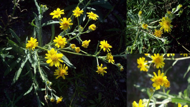 Senecio girsebachii. Asteraceae. Fotos tomadas al margen del Lago de Palmar entre gramíneas, departamento de Soriano, Uruguay. Senecio grisebachii var. leptotus.